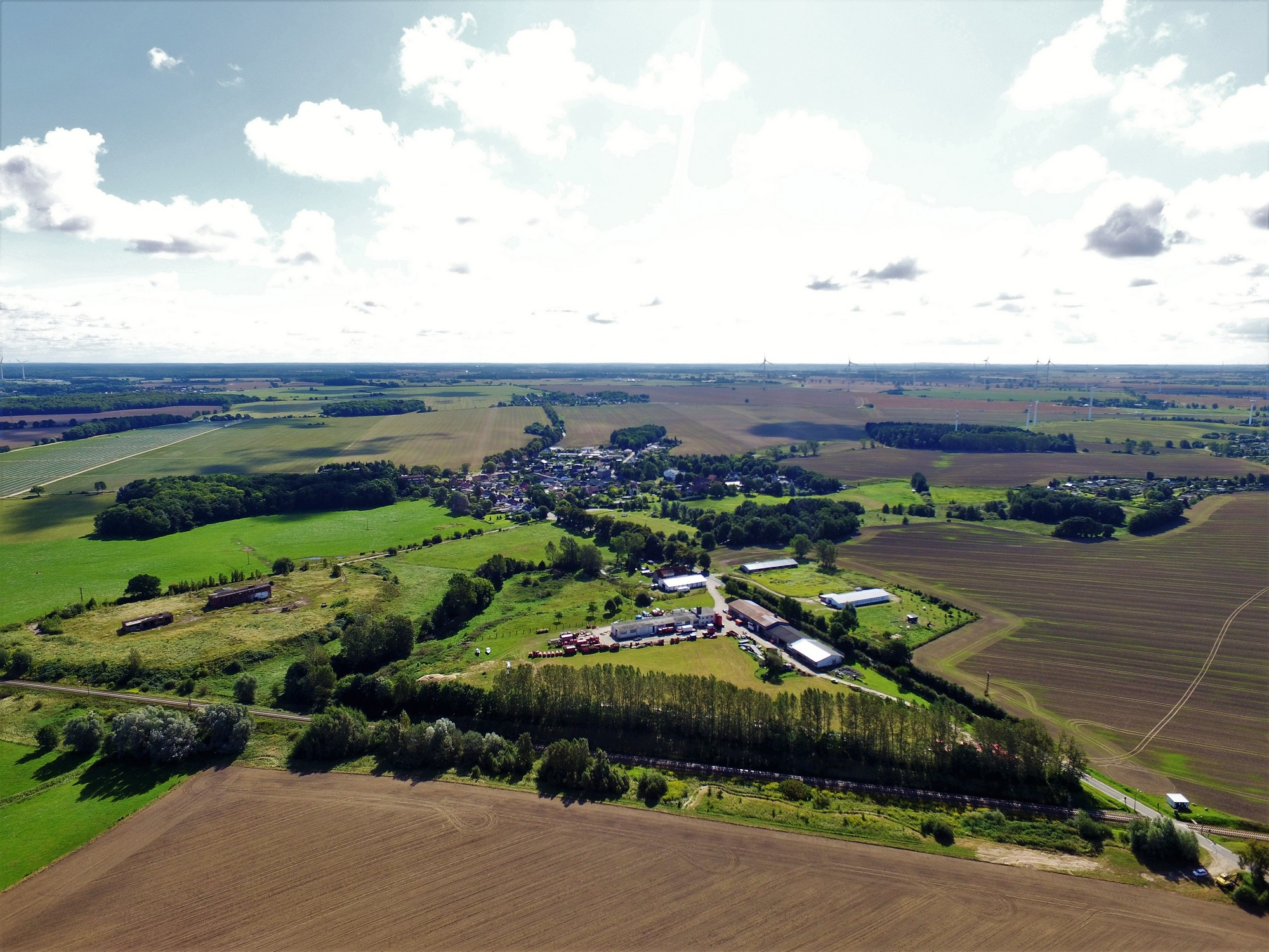 Ein Luftbild von Klein Kussewitz aufgenommen im September 2017 mit Blickrichtung aus Mönchhagen. Erstellt und bereitgestellt von R. Bösenberg